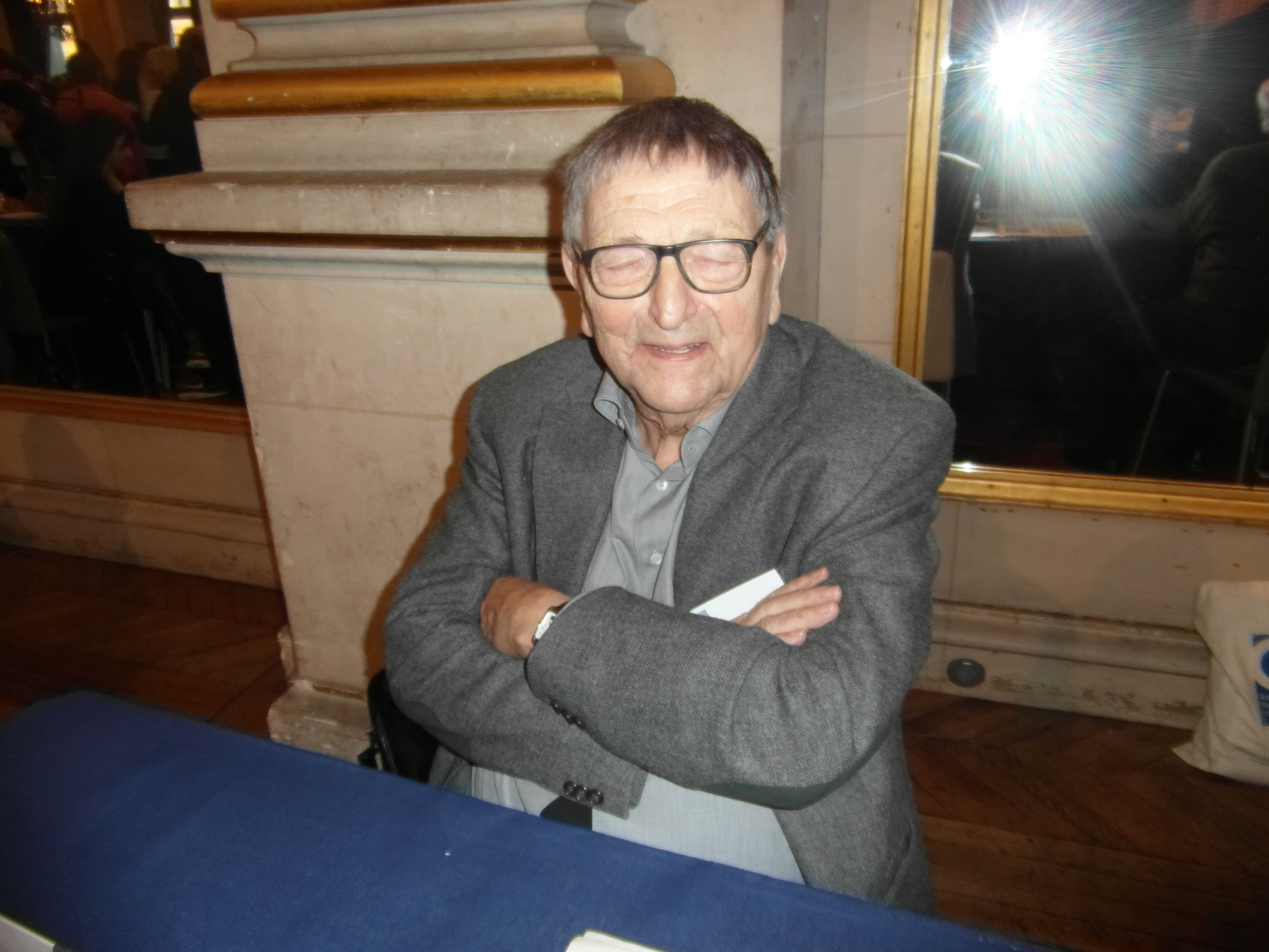 Maghreb des Livres, 7 et 8 février 2015